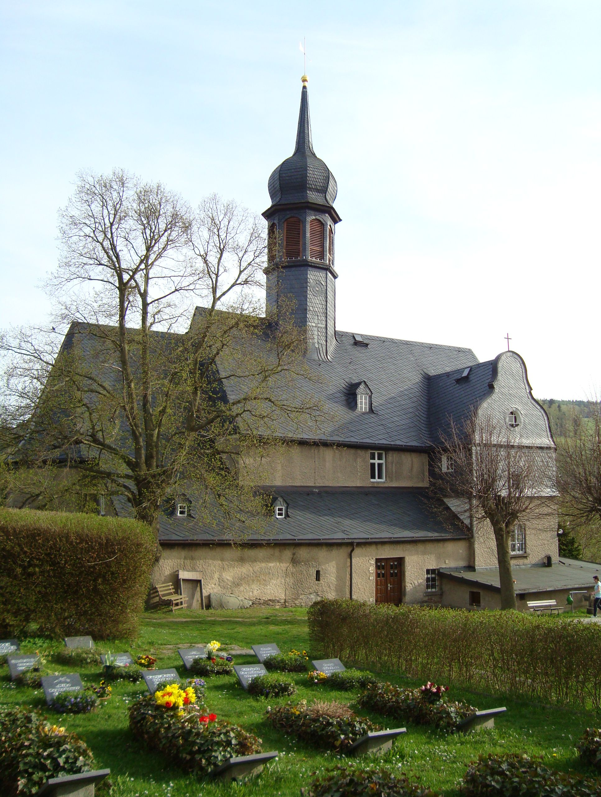 St. Barbarakirche in Markersbach im Erzgebirge, Nordostansicht